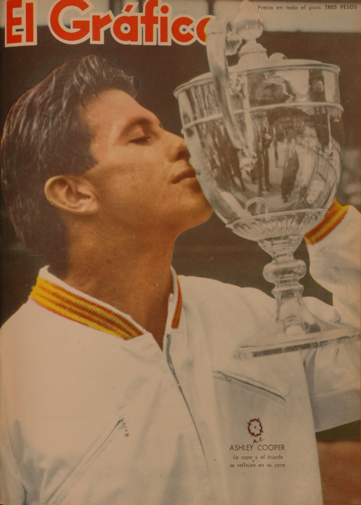 El Grafico del 08 de Agosto de 1958. Edicion 2030